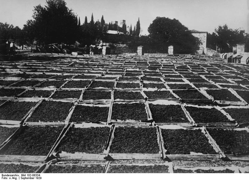 Hier trocknen Milliarden Korinthen! Blick auf eine Trockenanlage von Milliarden Korinthen auf der Insel Zante im Jonischen Meer.